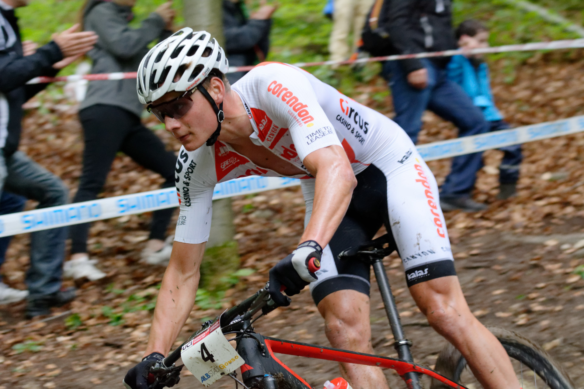 Mathieu van der Poel tijdens de Wereldbekermanche mountainbike in Albstadt in 2018